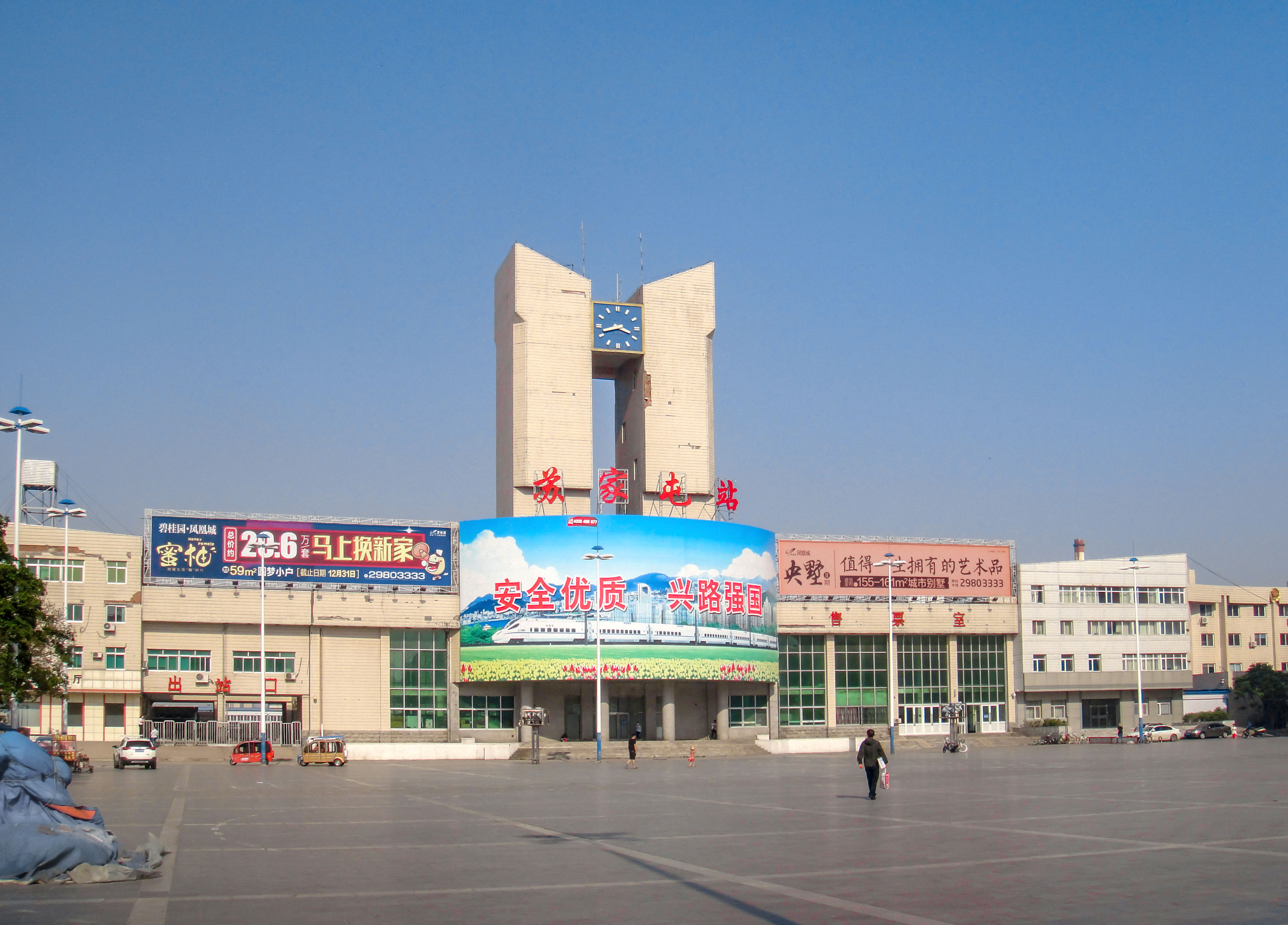 苏家屯火车站